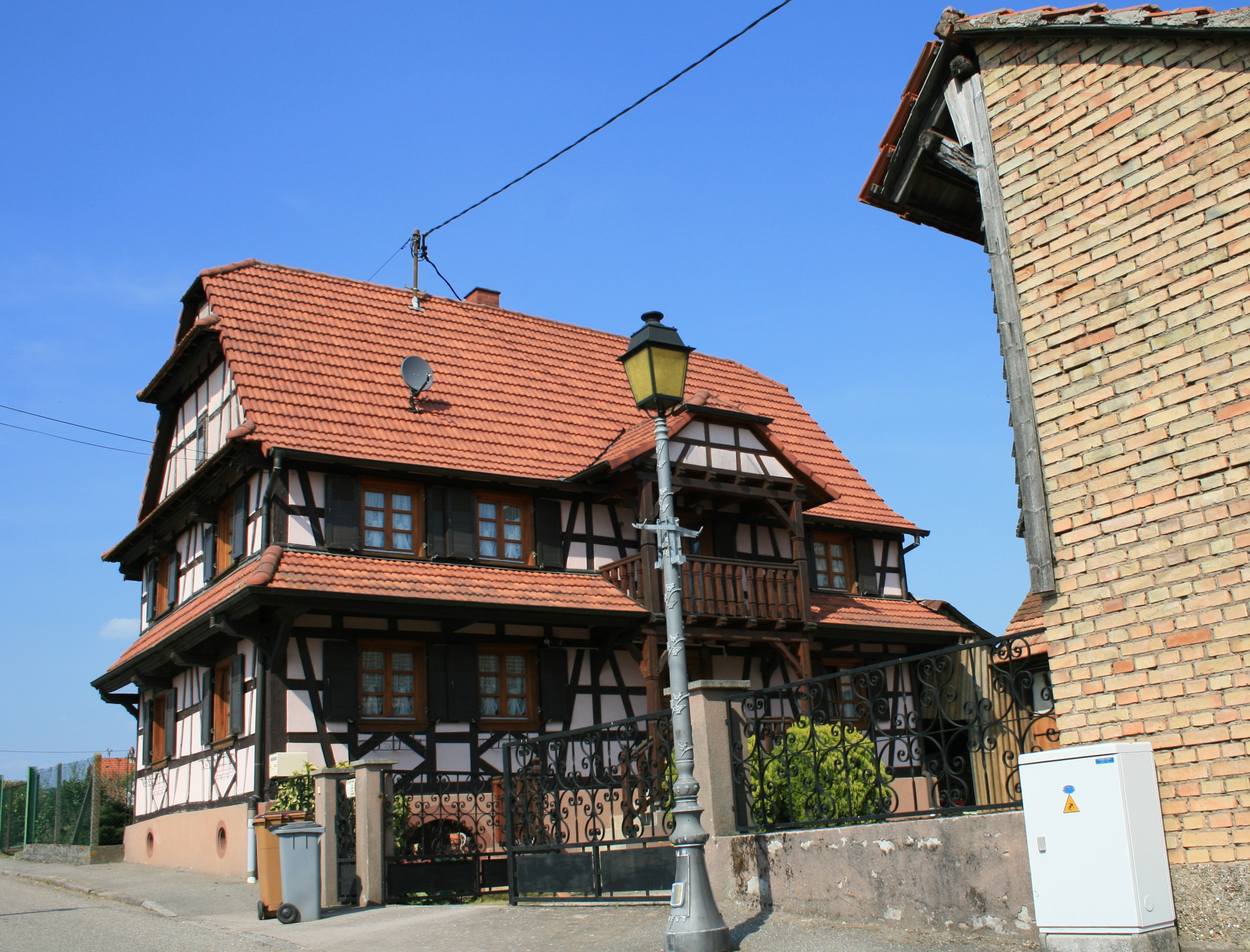 Dieffenbach-lès-Wœrth, Alsace